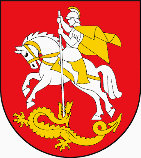 Herb gminy Komarów-Osada • Coat of arms of gmina Komarów-Osada